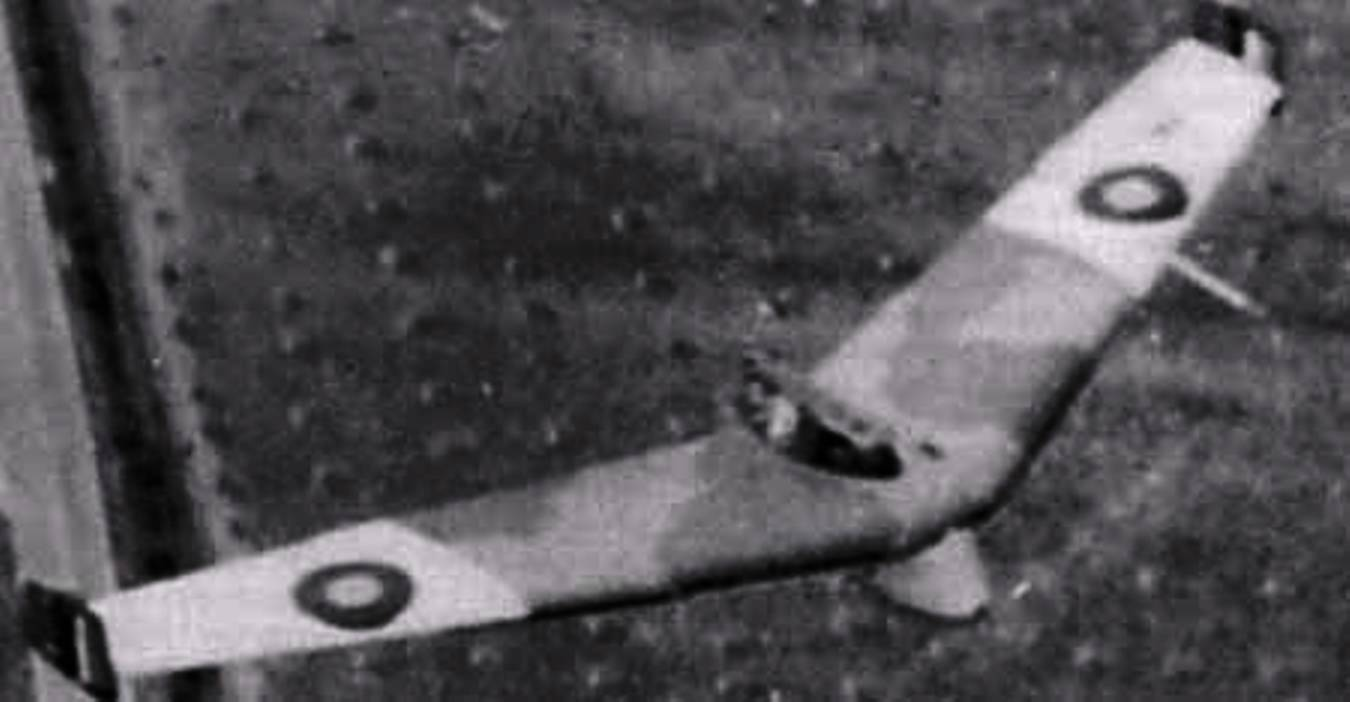 De:Baynes Bat En:Baynes Bat